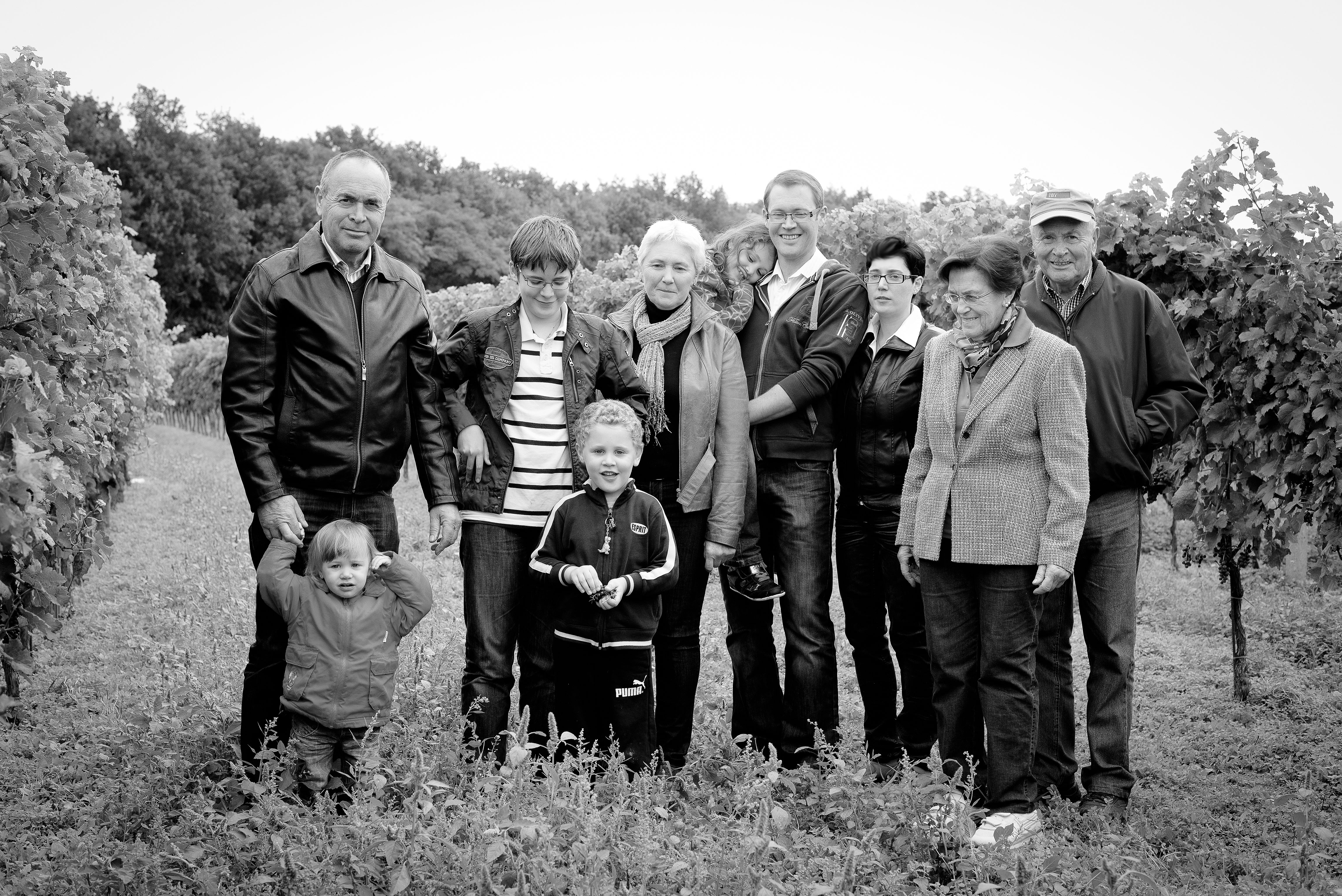 Iby Rotweingut Familie